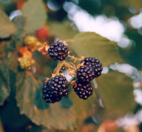 Rijpe bramen; foto door Fruggo, augustus 2003